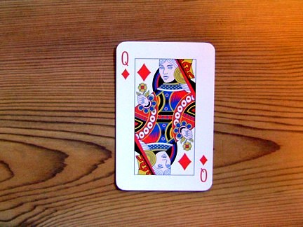 ruder dame, til artikel om kortspil